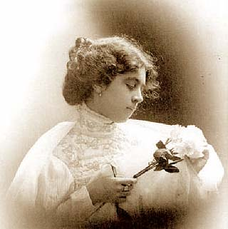 La escritora y feminista peruana Angelica Palma